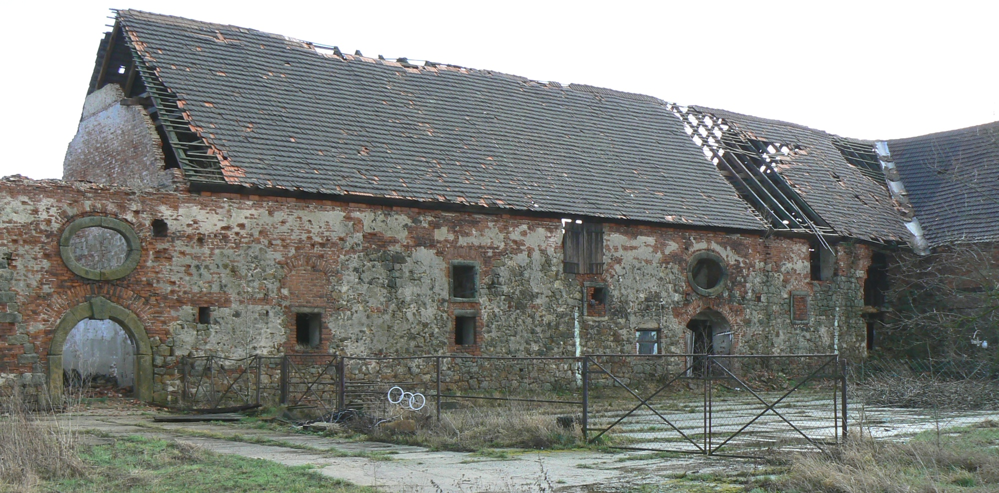 Die monumentale Architektur des Frühbarockbaus verleiht dem Pferdestall einen herrschaftlichen Charakter.